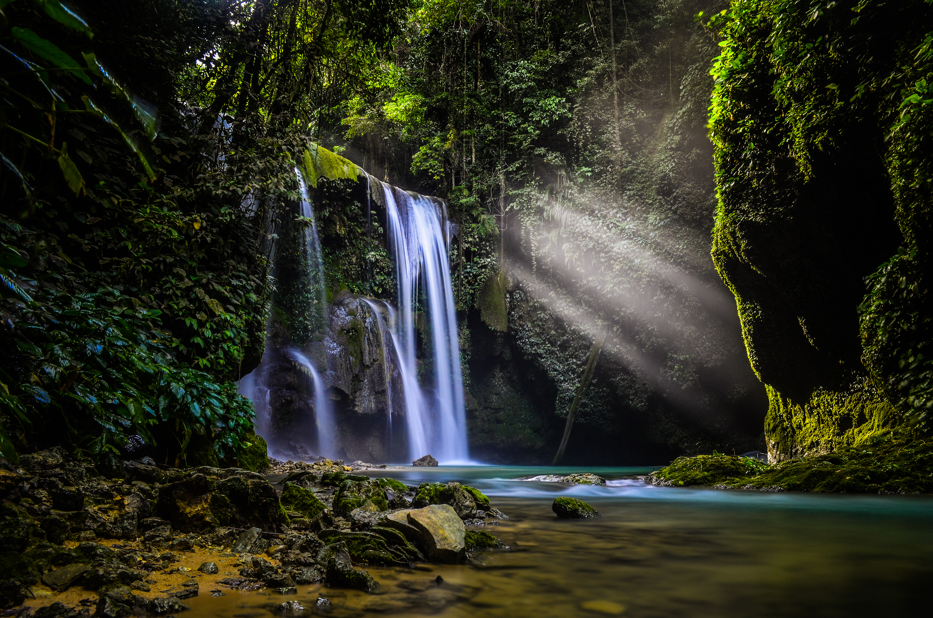 Air Terjun Laumarang berada di kota Luwuk Kabupaten Banggai merupakan landmark kota Luwuk